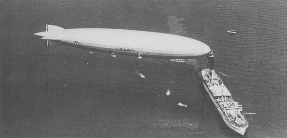 LZ126 an der USS Patoka